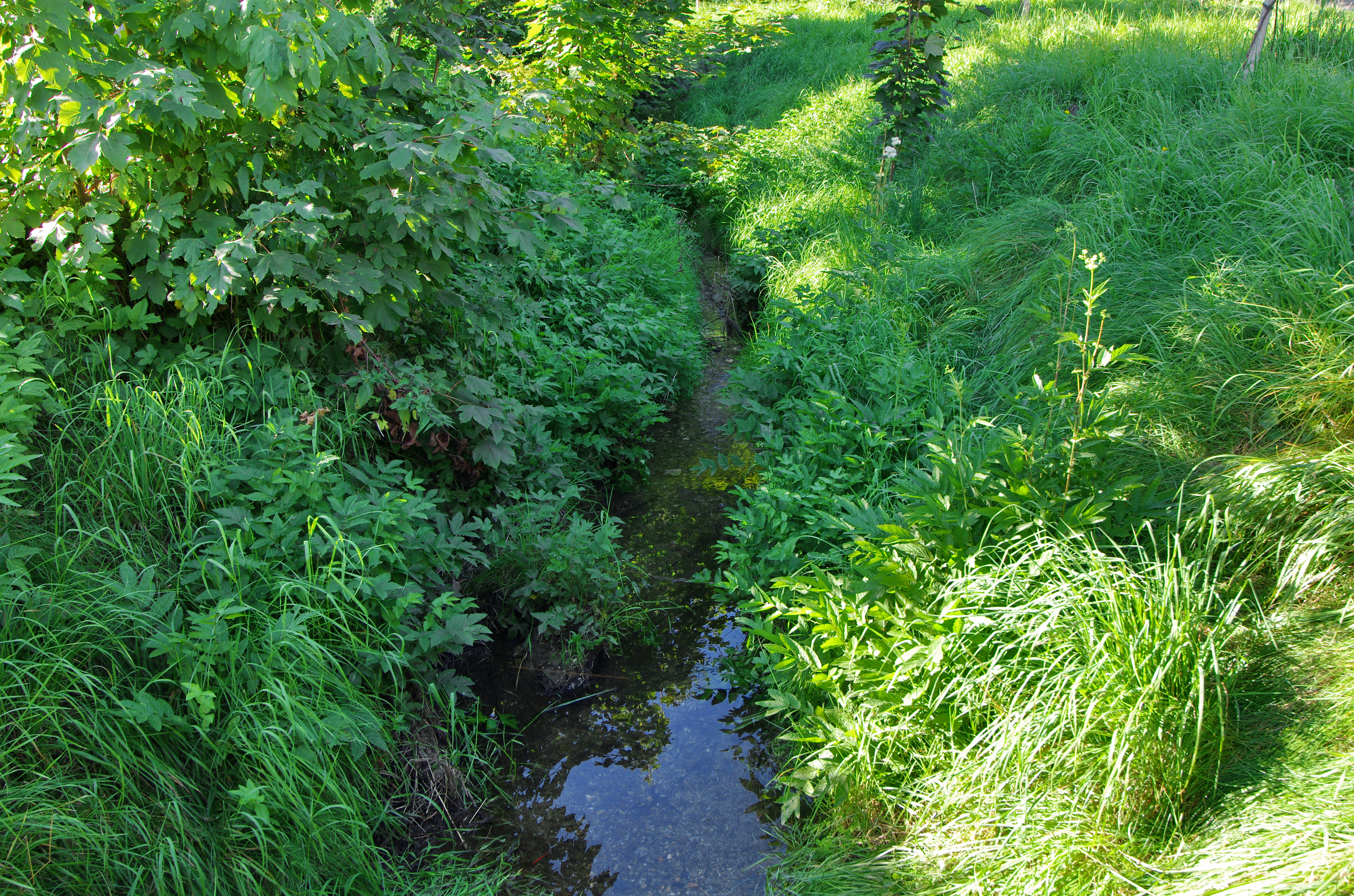 Čirý potok v Čiré, místní části Kraslic, okres Sokolov